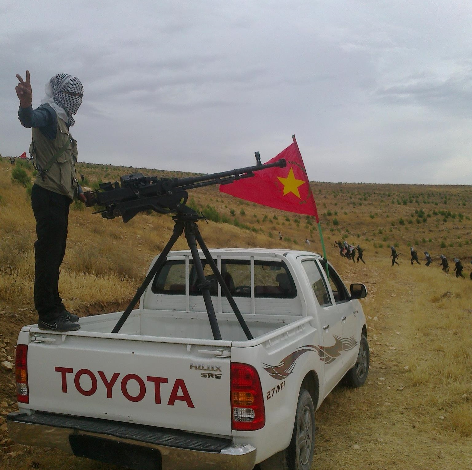 2012 YPG